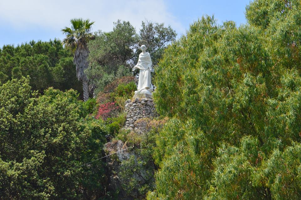 La statua della Madonna Immacolata, realizzata dallo scultore Angelo Gemini nel 1954, posta sulla collina (il Monte Morrone) alle spalle della Chiesa dell'Immacolata di San Felice Circeo (LT)